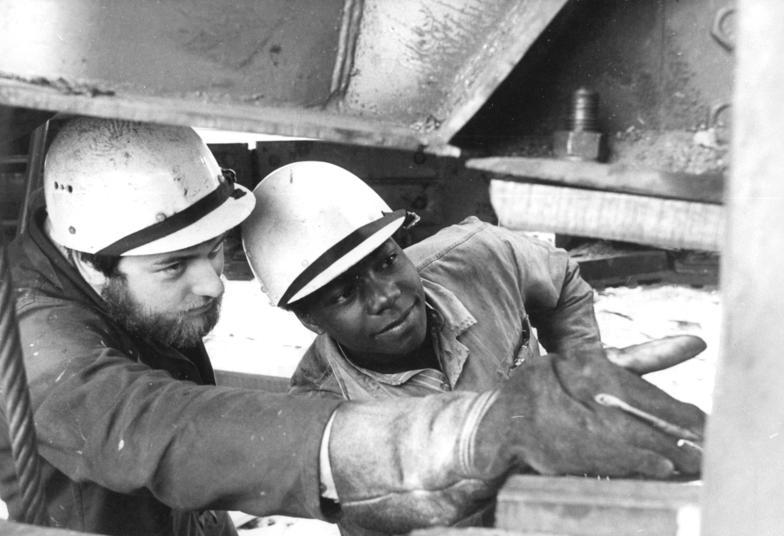 ADN-ZB / Weisflog / 12.7.84 Bezirk Cottbus: Großinstandsetzung. K.[...*] M.[...*] (r. ) gehört zu den 40 Mocambiquanern die im Braunkohlewerk Welzow eine Ausbildung als Meister erhalten. Er ist seit 5 Jahren in der DDR und spezialisiert sich auf die Instandsetzung von Tagebaugroßgeräten, nachdem er den Beruf eines Instandhalters erlernt hat. Links: J.[...*] W.[...*] [*BArch: Namen aus Gründen des Persönlichkeitsrecht anonymisiert]